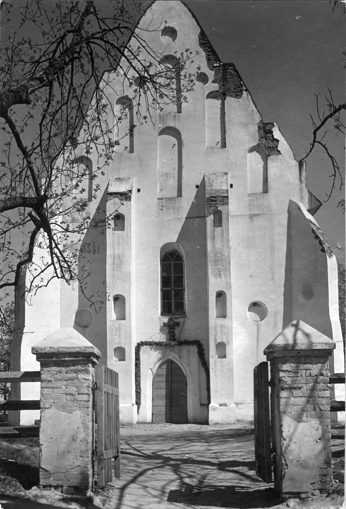 Беларуская (тарашкевіца): Ішкальдзь (Iškaldź)